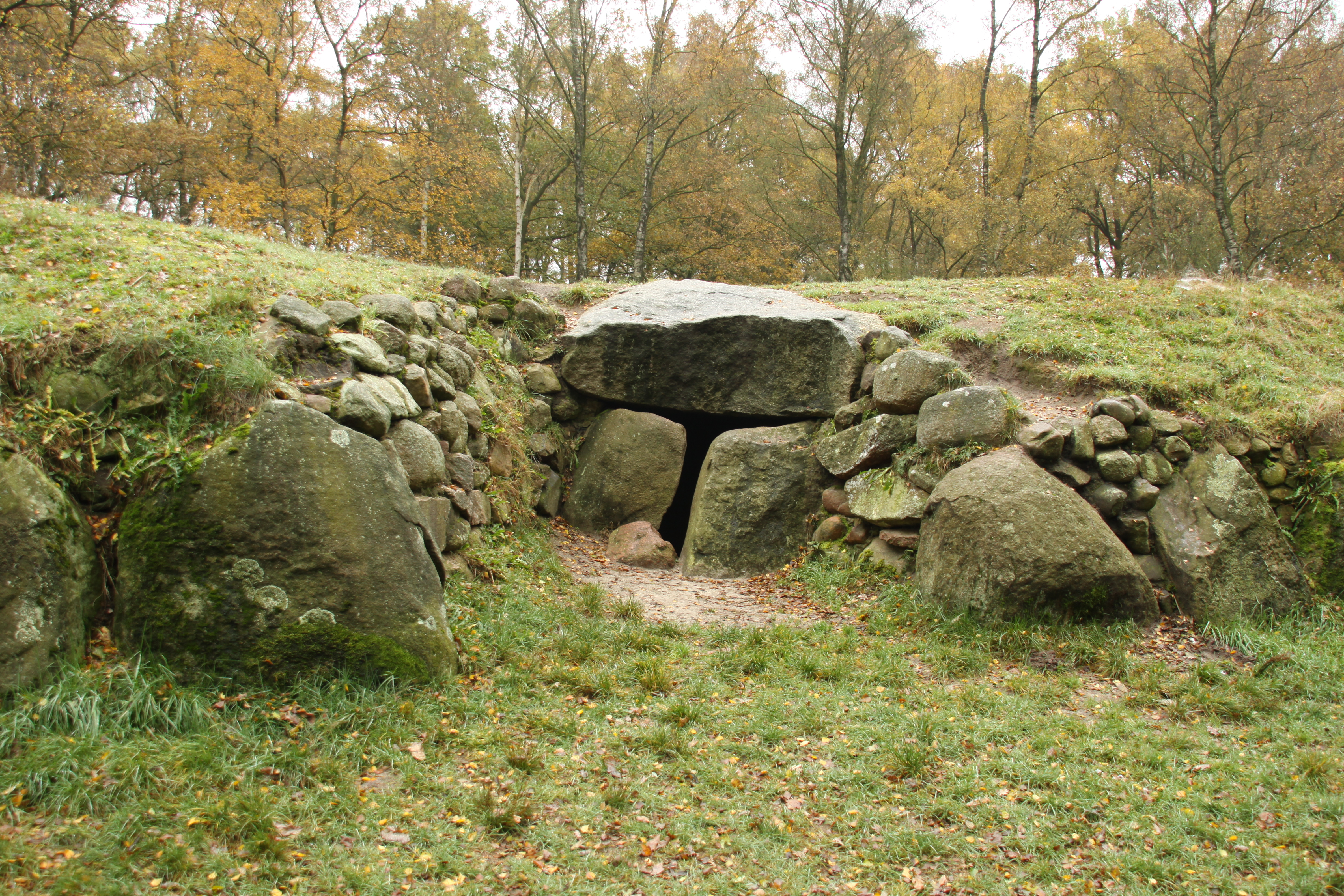 Rekonstruiertes Großsteingrab in Kleinenkneten